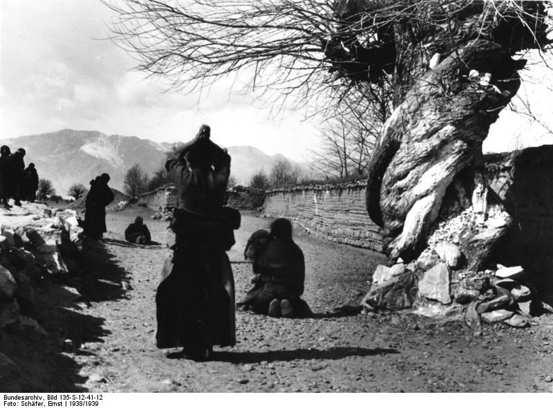 Lhasa, heilige Opferweide mit Pilgern am Linkhor